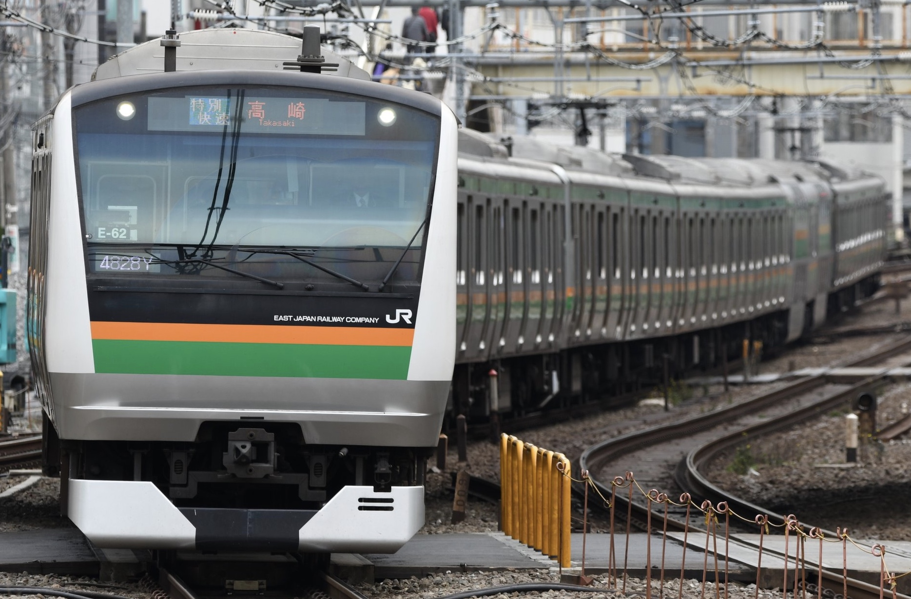 恵比寿〜渋谷を走行する湘南新宿ラインE233系3000番台+E231系1000番台